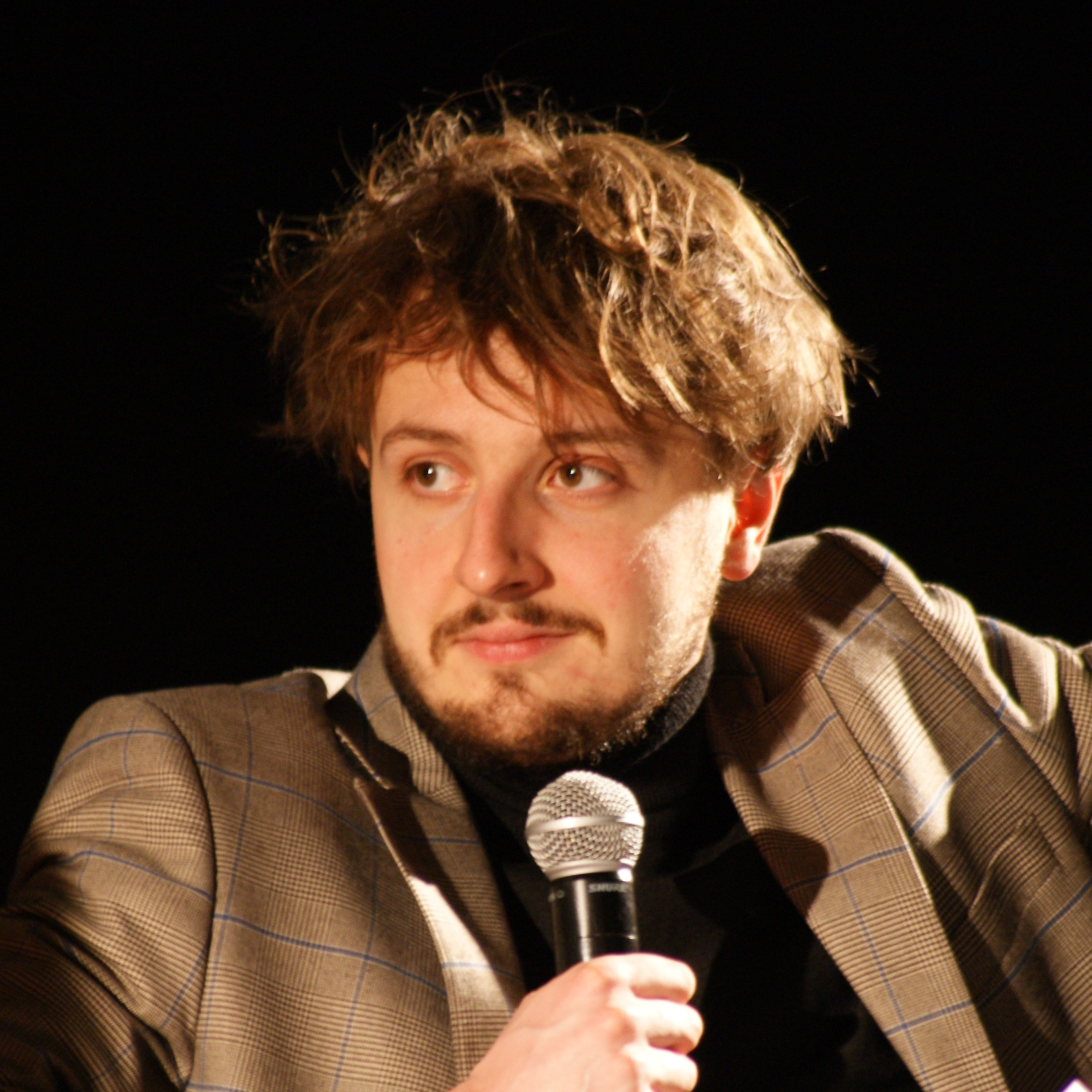 Piotr Czerkawski podczas dyskusji z Agnieszką Wolny-Hamkało w Kinie Nowe Horyzonty, Wrocław 22 stycznia 2020. Powiększenie zdjęcia Piotr Czerkawski.jpg